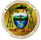 Escudo Episcopal